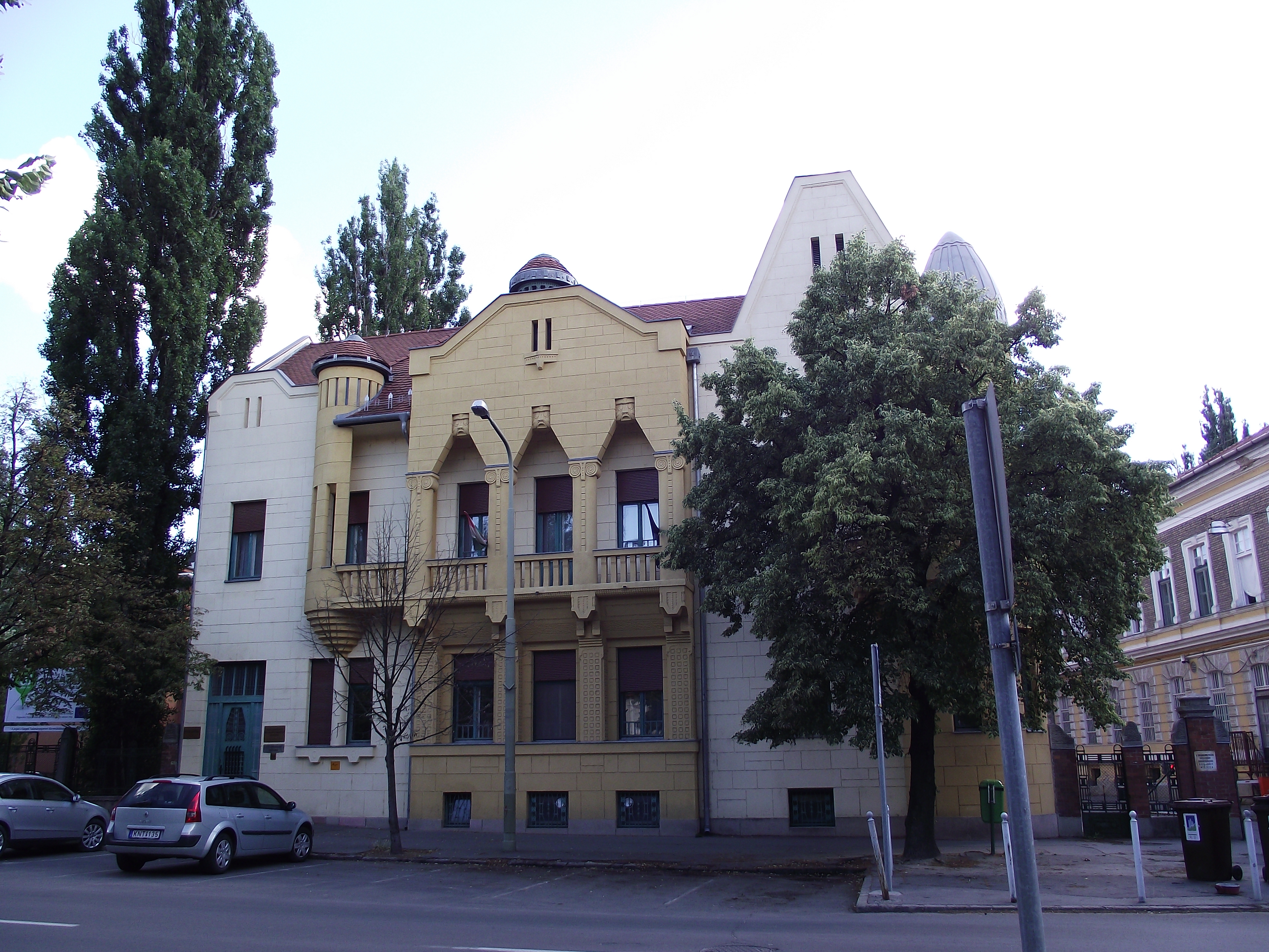 lásd a címet